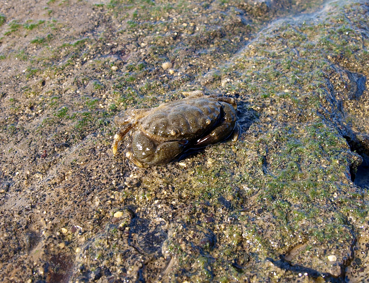 Le crabe Leptodius sanguineus à la Réunion.